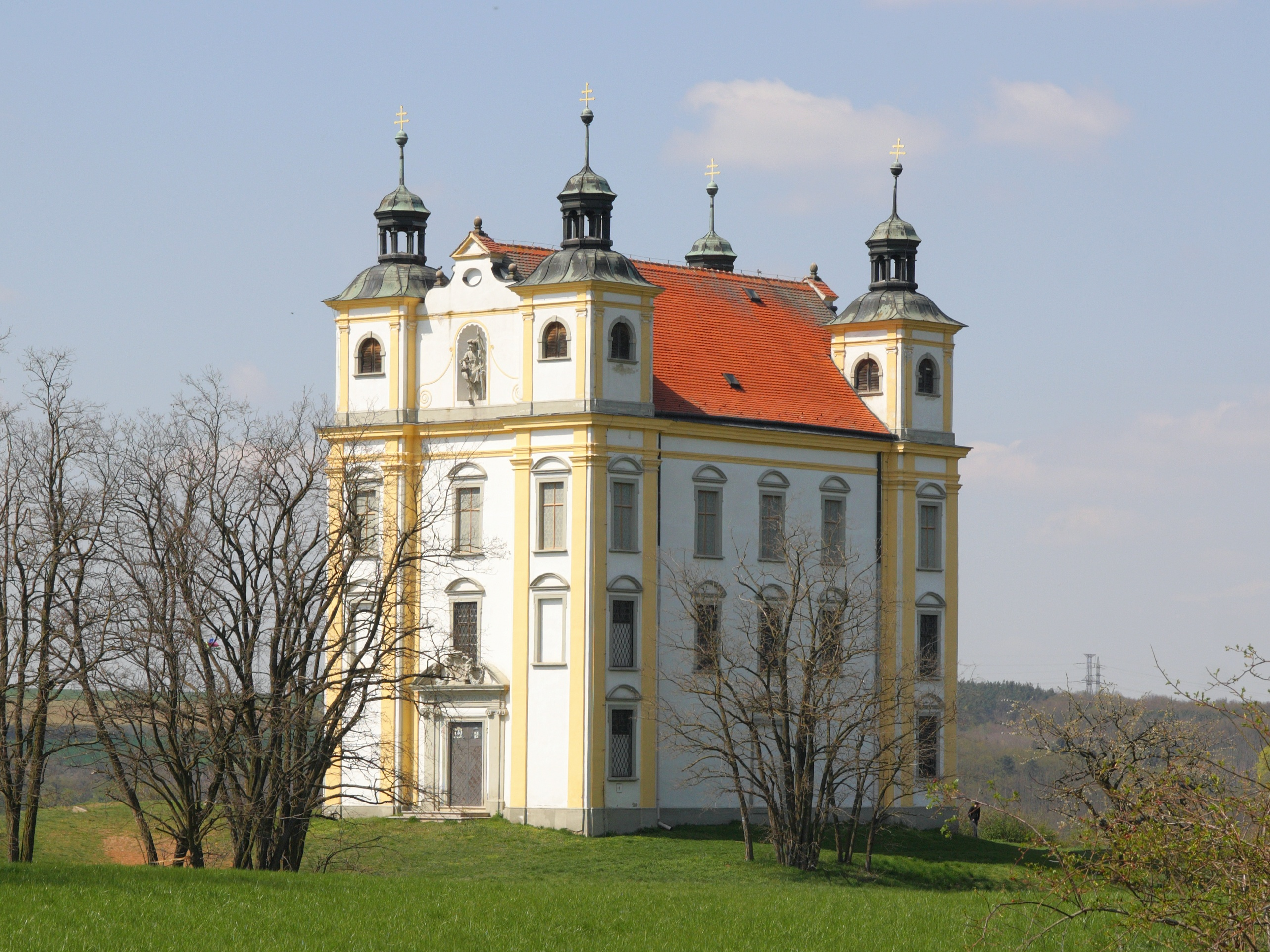 Moravský Krumlov - kaple svatého Floriána.